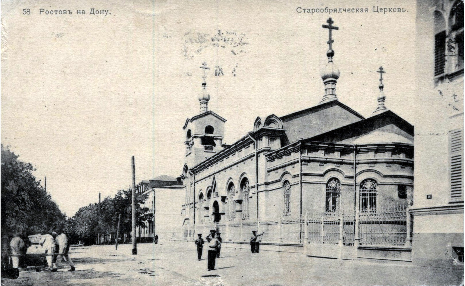 Старообрядческая церковь Покрова Пресвятой Богородицы в Ростове-на-Дону. Фотография опубликована 27 октября 1913 года в газете "Приазовский край".